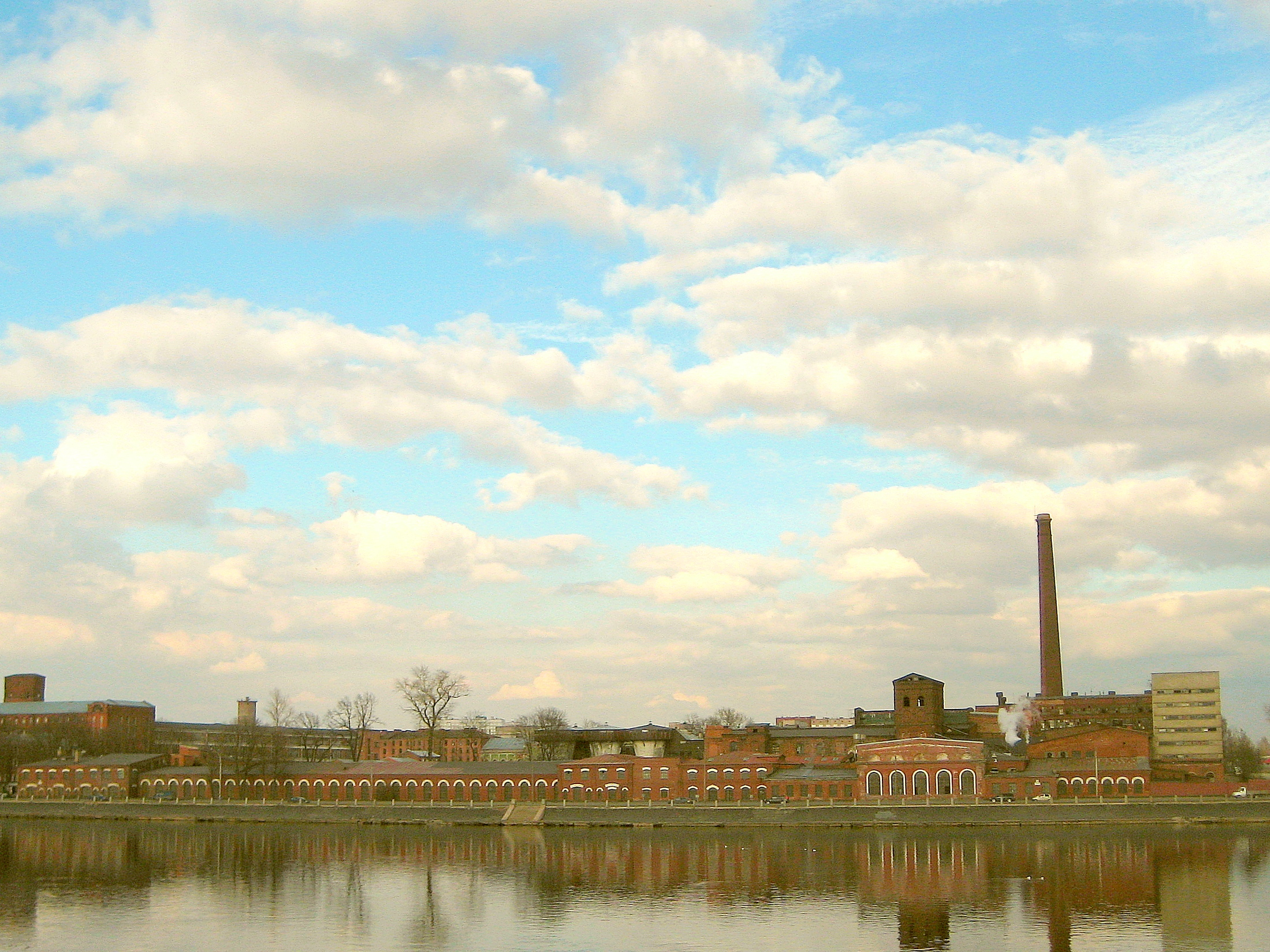 Санкт-Петербург. Октябрьская набережная, 54-56. Фабрика Товарищества Невской писчебумажной фабрики "Братья Варгунины". Архитектор - Шауфельбергер Л.Л.